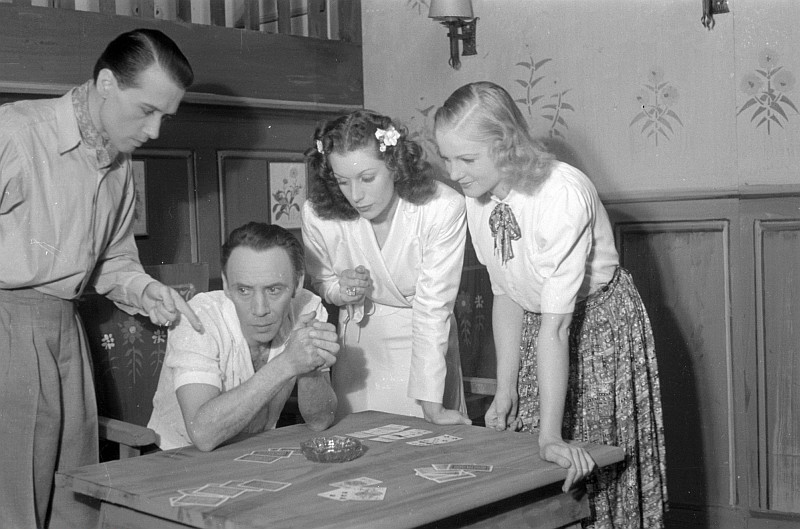 Original image description from the Deutsche Fotothek Szenenbilder mit Rudolf Platte